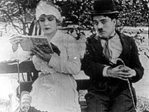 Fotografía de la película In the Park de Charlie Chaplin de 1915